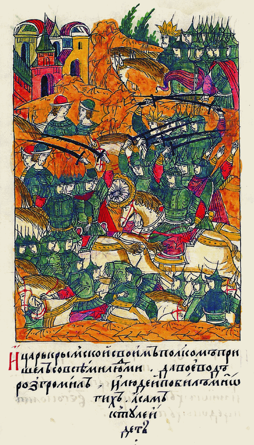 Лицевой летописный свод "...а сам пошел из Москвы на третий день, в воскресенье, а с ним князь Владимир Андреевич да царь Казанский Симеон, да бояре и дети боярские многие".